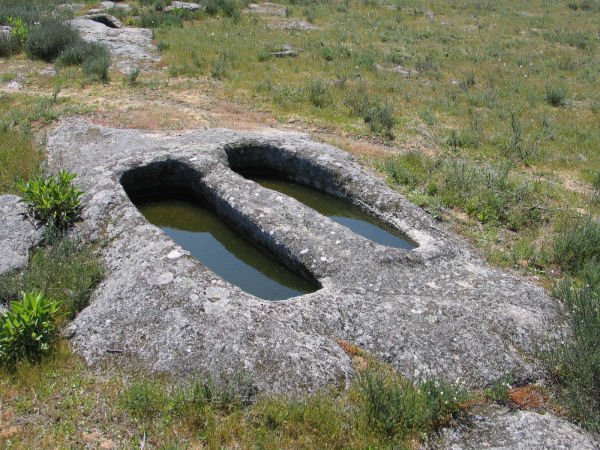 Sepulturas escavadas na rocha. Forcadas, Fornos de Algodres, Portugal